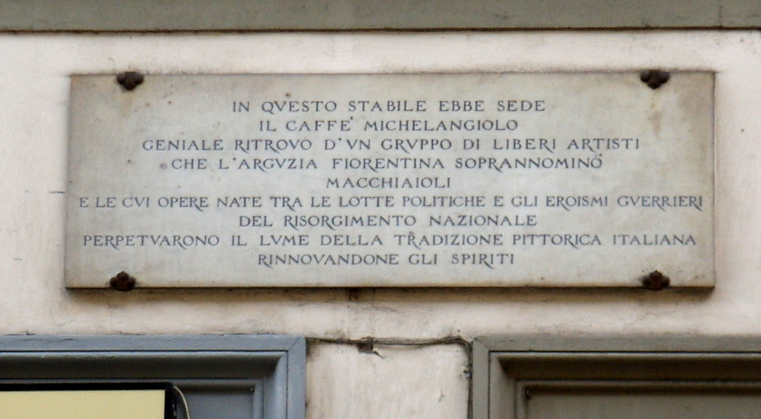 Lapide sul luogo in cui sorgeva il Caffè Michelangelo, luogo d'incontro dei pittori macchiaioli a Firenze. florence italy